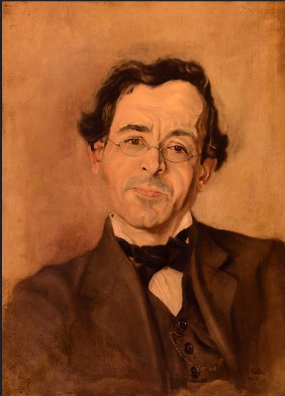 Tableau de Catti peint en 1915